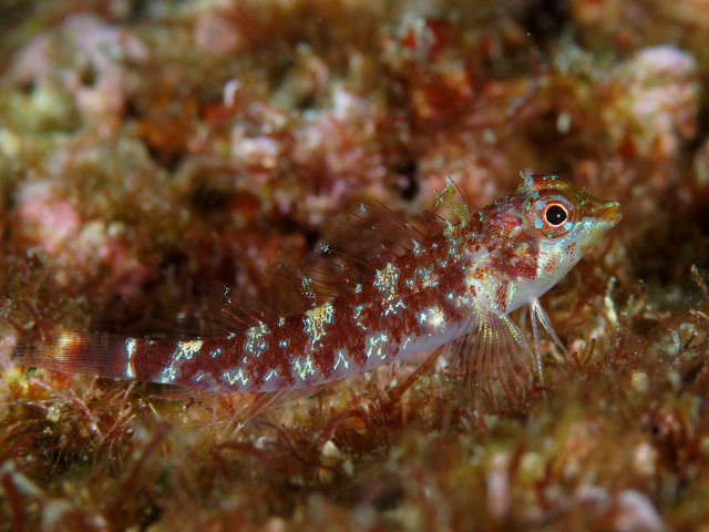 アカヘビギンポ Enneapterygius phoenicosoma